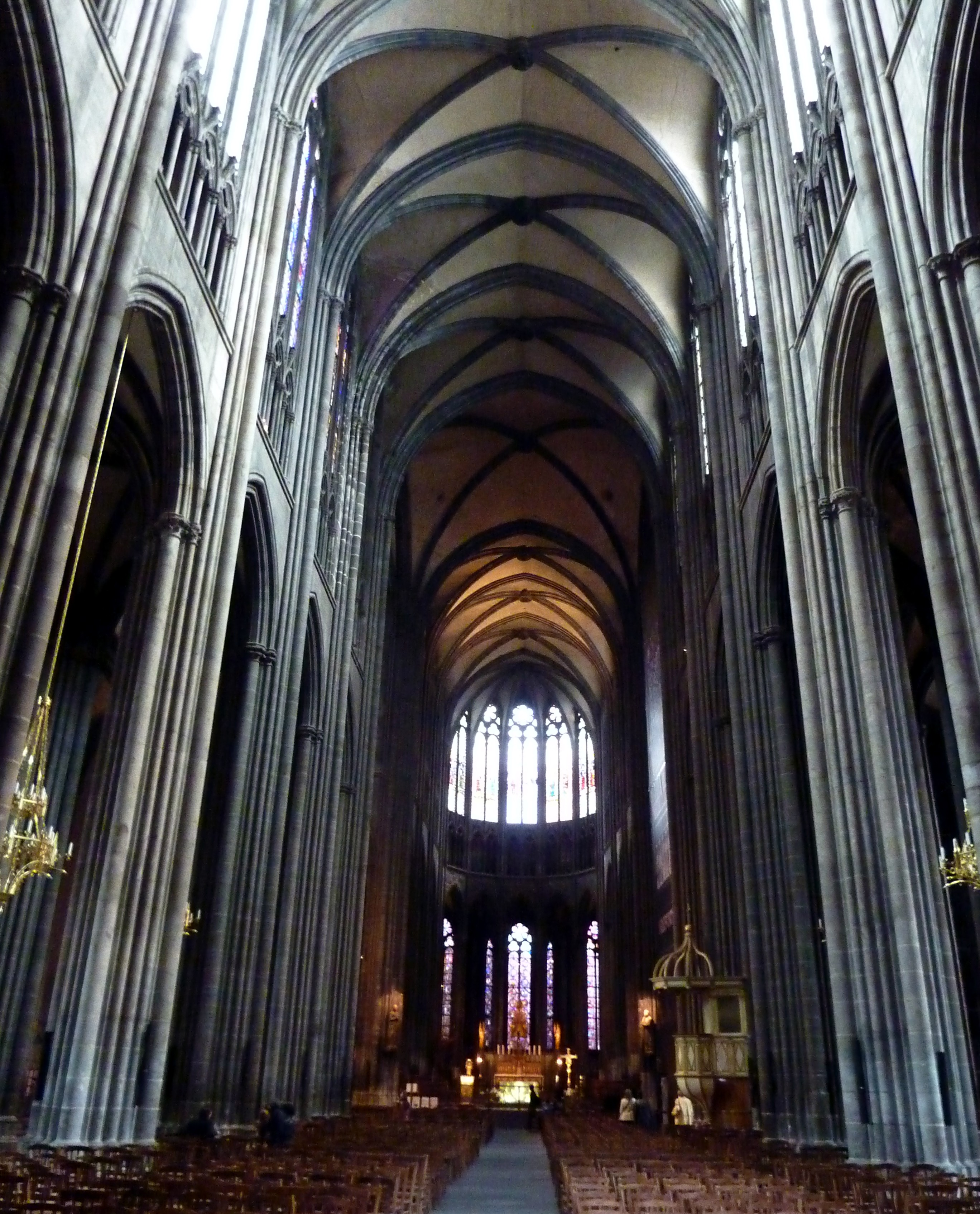 Cathédrale Notre-Dame-de-l'Assomption de Clermont